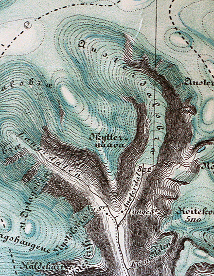 Austerdalsbreen på kart fra 1901.